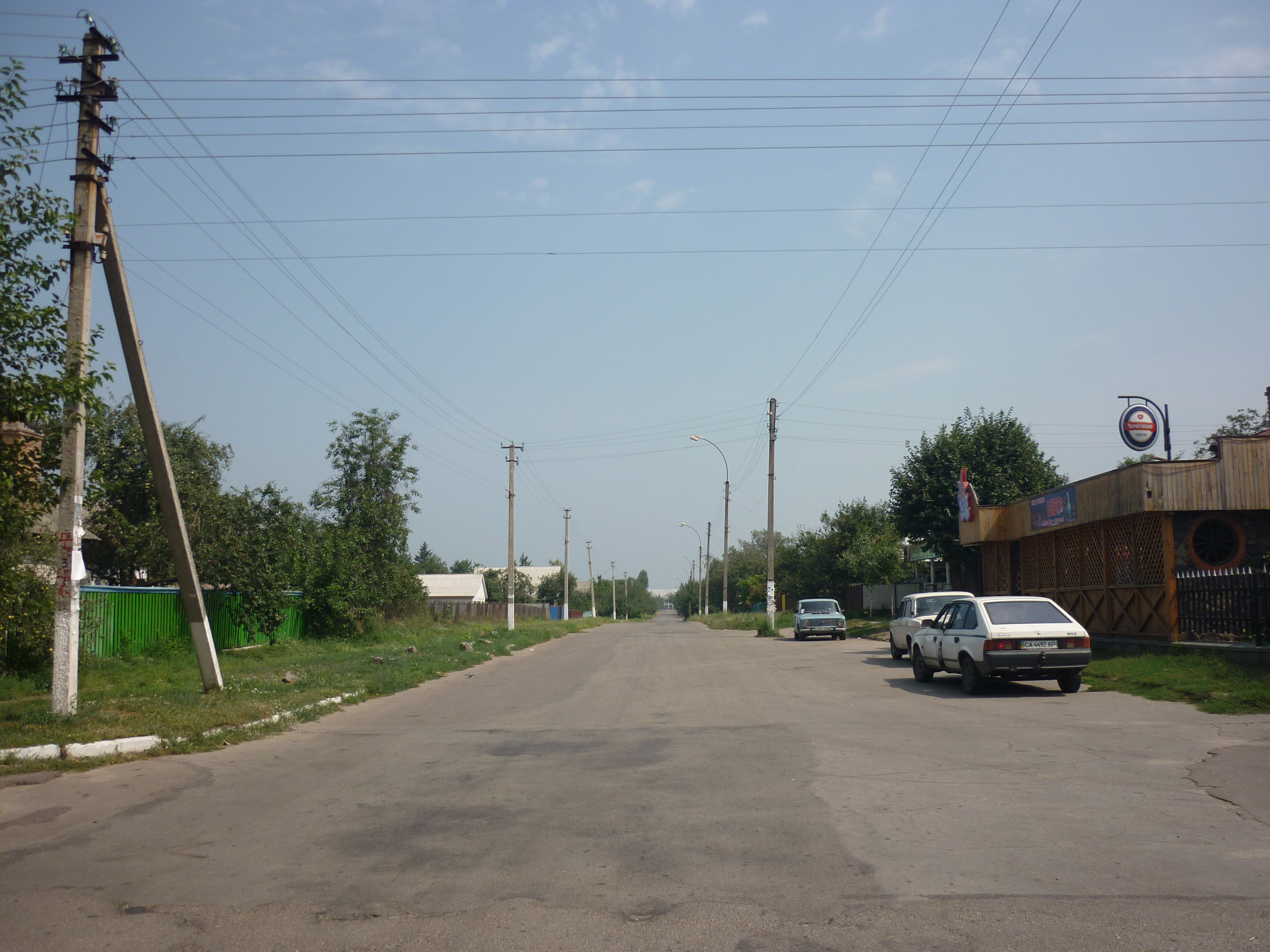 село Леськи Черкаського району Черкаської області, Україна